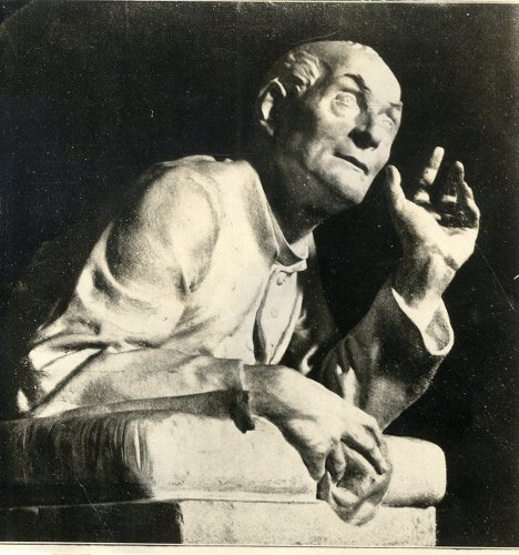 Büste von Joseph Mohr (Verfasser von "Stille Nacht, Heilige Nacht"), Photographie aus der Photosammlung des Tagblattarchivs; Wienbibliothek, Dokumentation, TF 007134